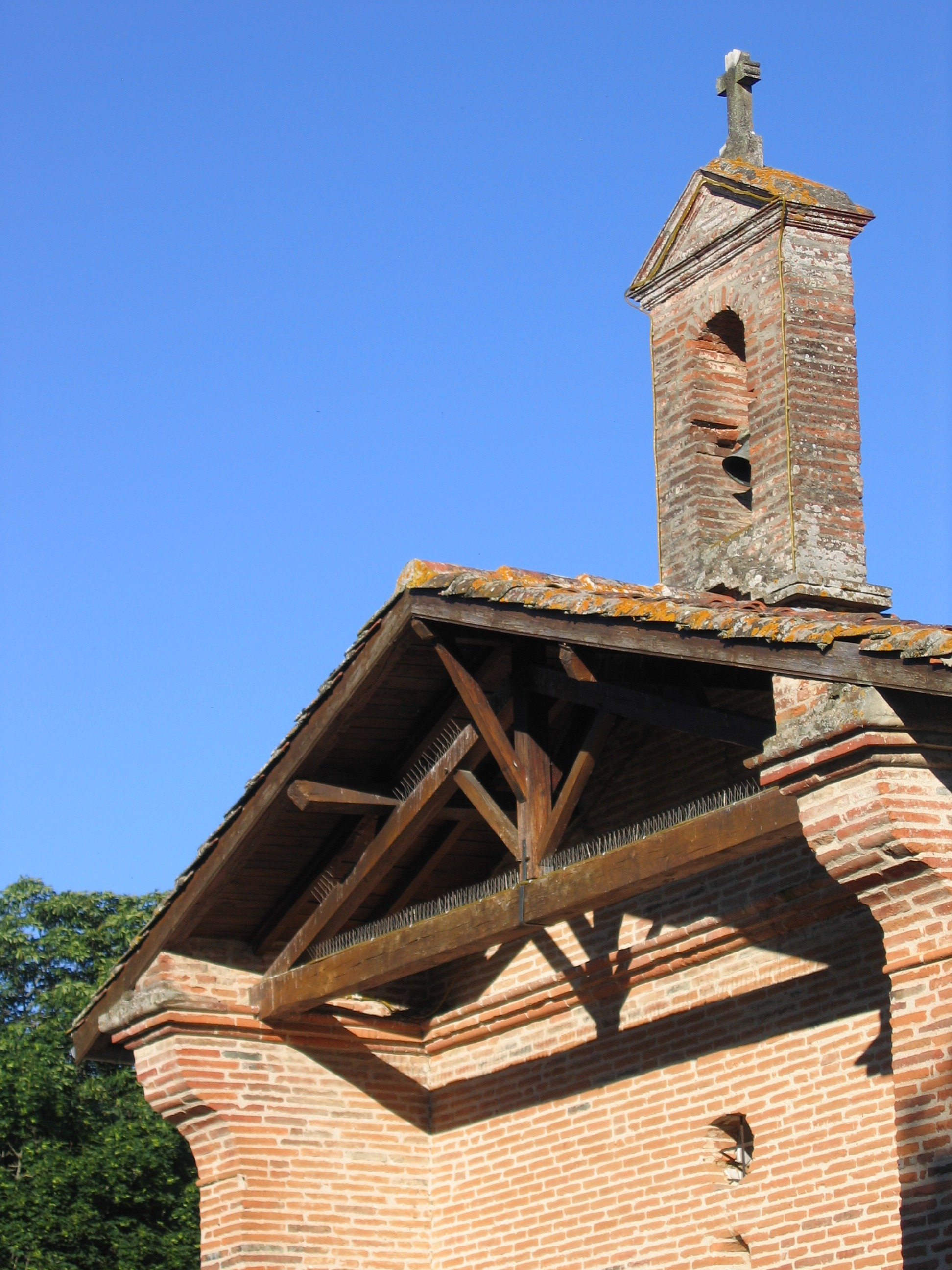 Chapelle "Notre Dame du Bout du Pont" de Lherm (Haute-Garonne)